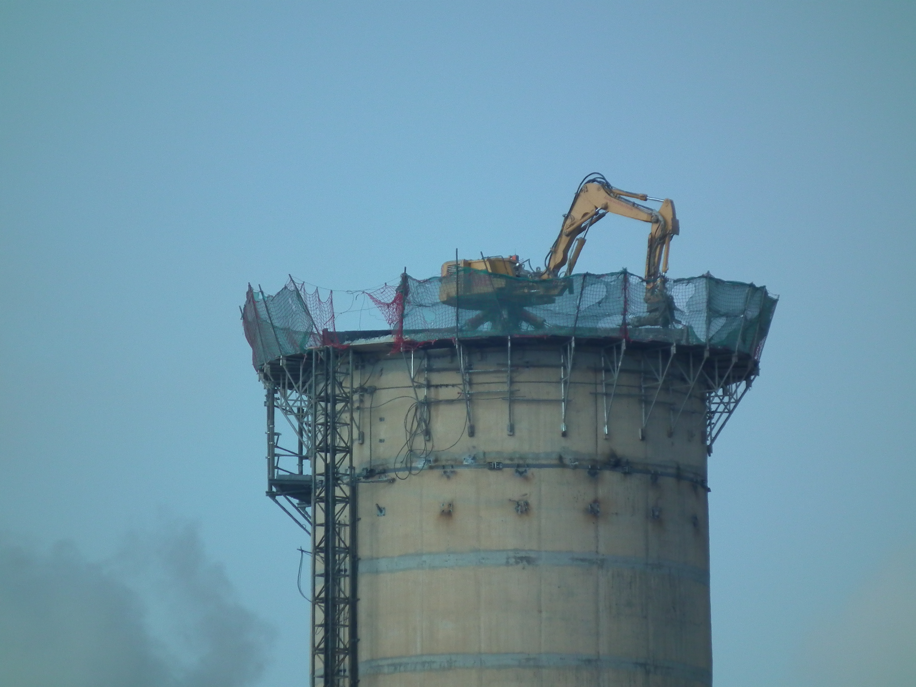 Heizkraftwerk Dresden-Reick